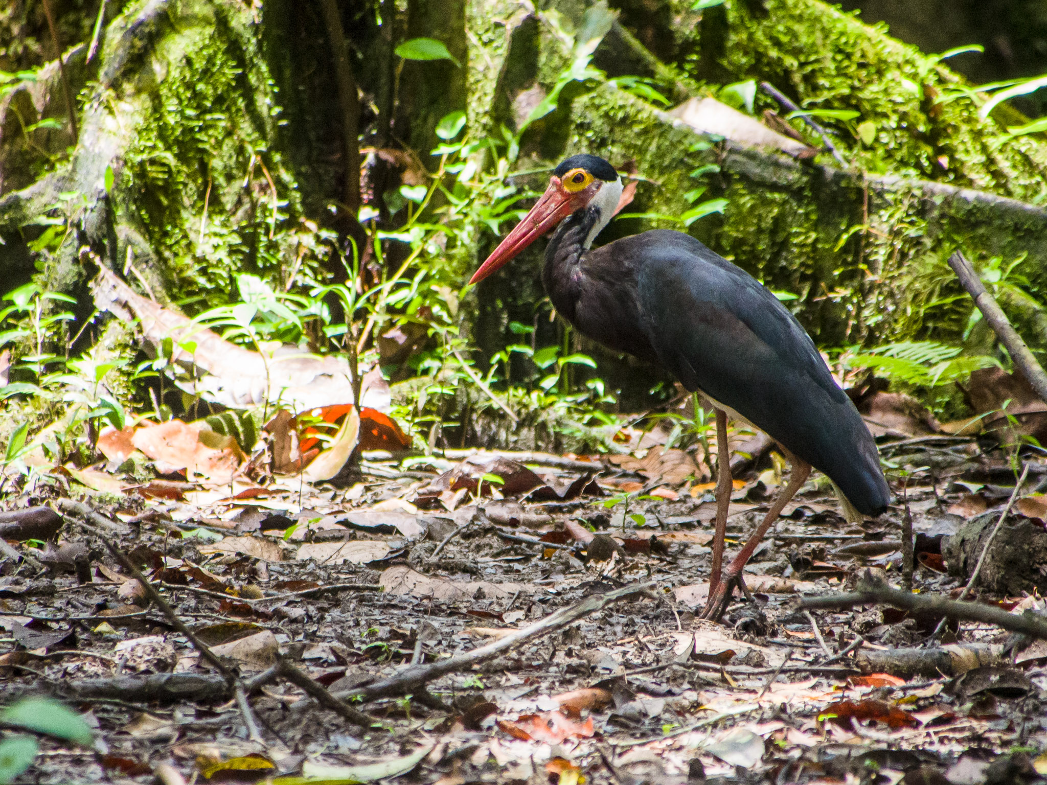 Storm's Stork